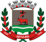 Brasão de Armas do município de Getulina - SP - Brasil.